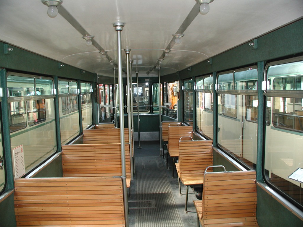 Innenraum des Aufbautriebwagens 1872